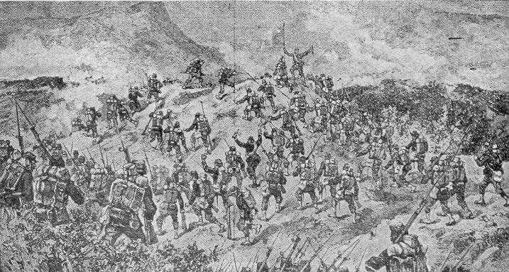 Batalla de Los Ángeles, 22 de marzo de 1880.